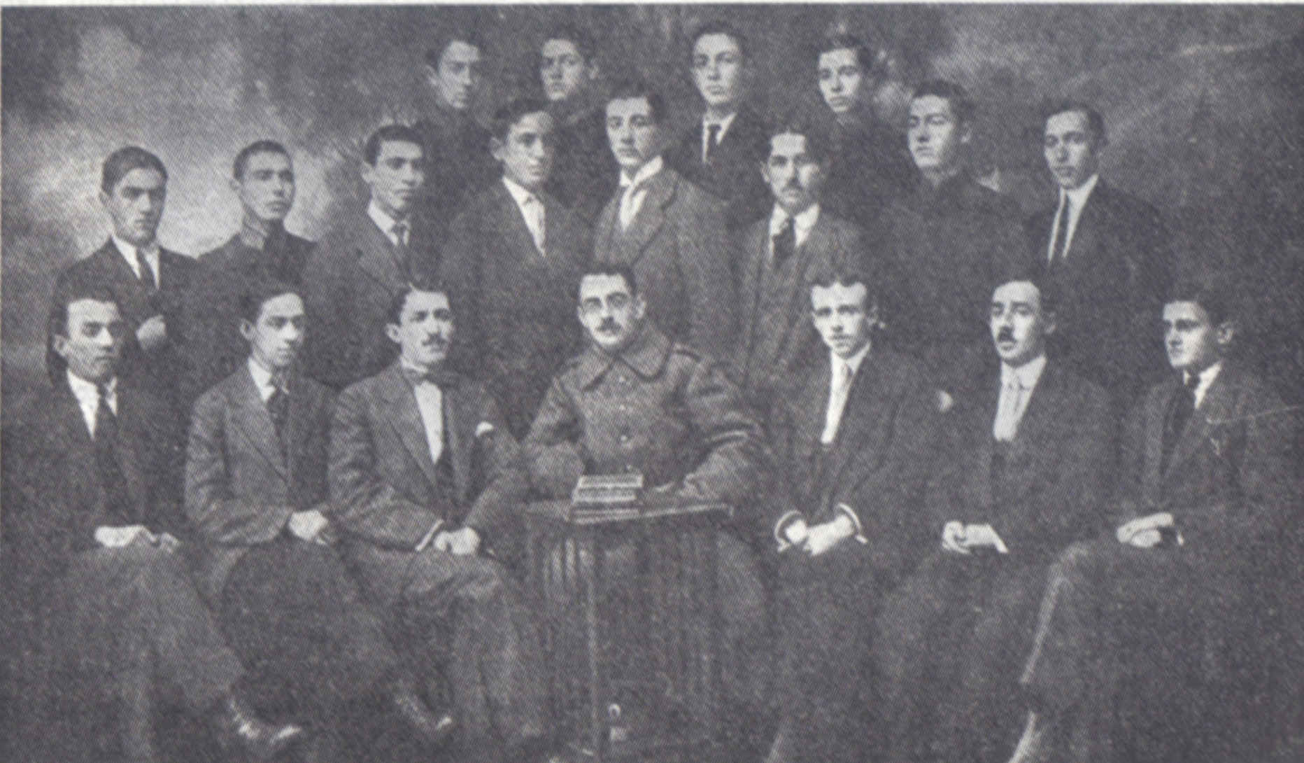 כינוס ועידת תנועת הנוער ההסתדרות לשפה ולתרבות עברית אשר נערכה בפלובדיב בולגריה במהלך מלחמת העולם הראשונה. במרכז שורת היושבים אלברט רומנו.